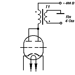 Пример трансформаторного согласования с нагрузкой